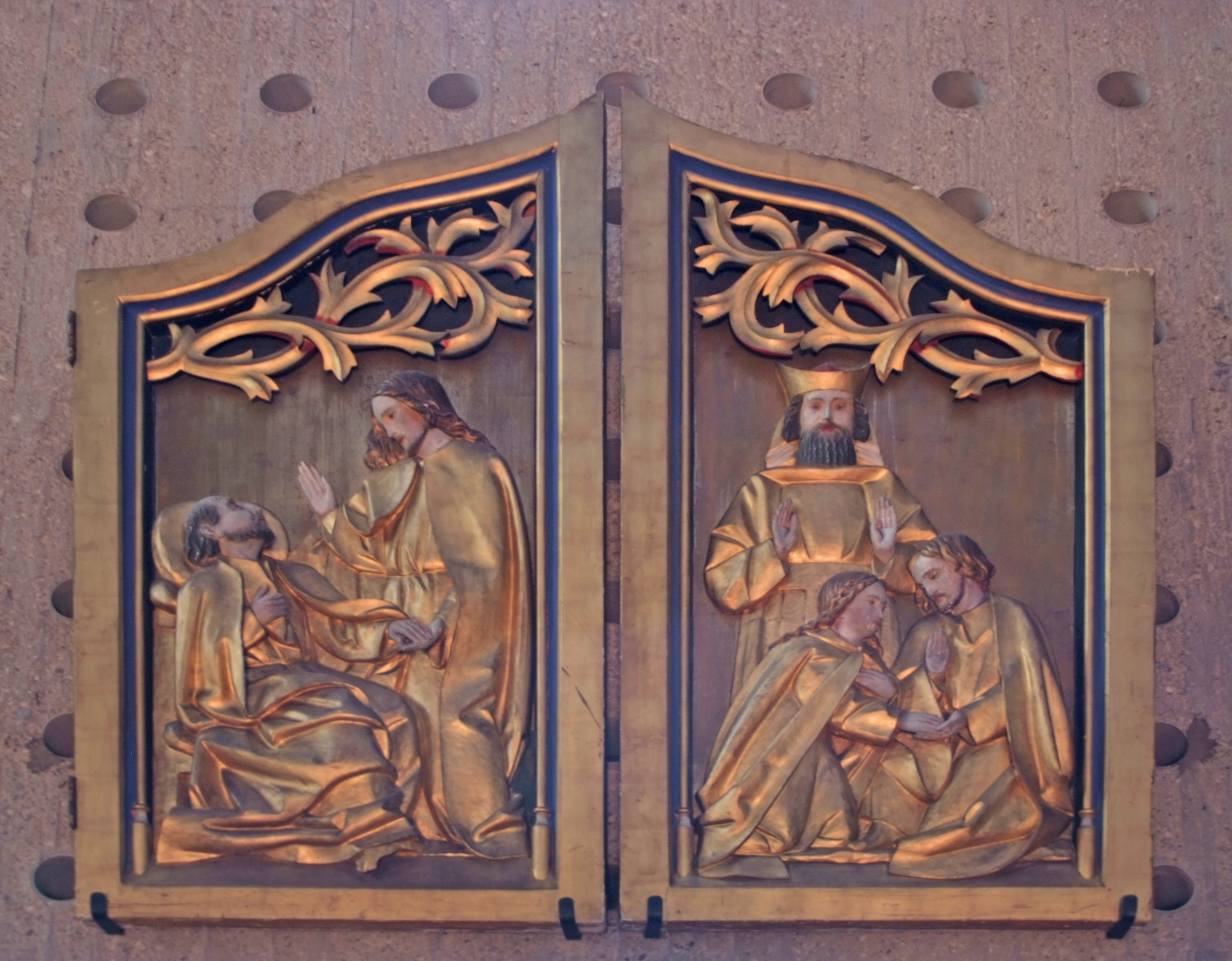 St. Ludwig (Saarlouis), Altarflügel mit dem Tod Josefs und der Verheiratung von Josef und Maria